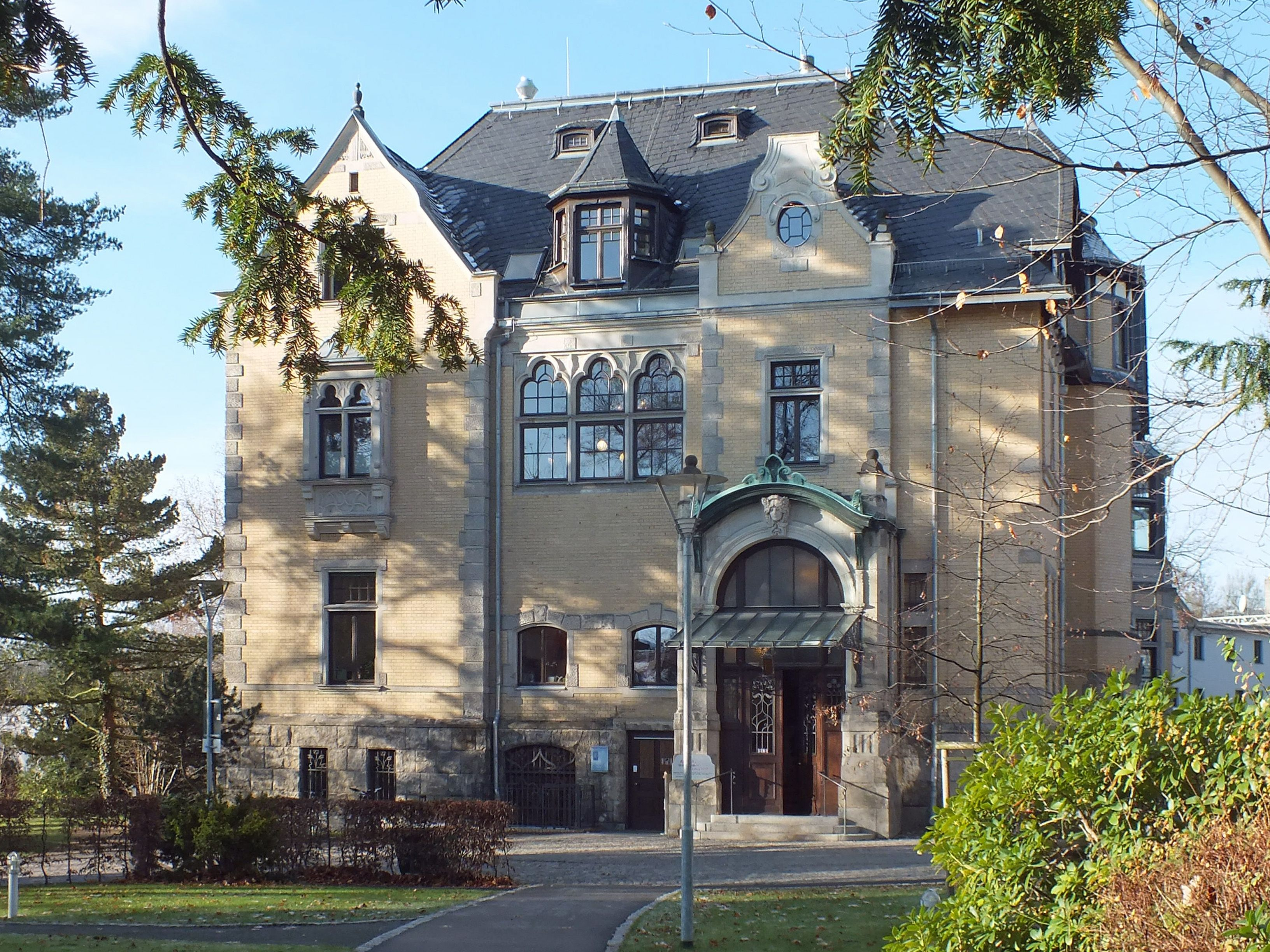 St. Elisabeth-Krankenhaus Leipzig. Das ambulante Rehazentrum in der ehemaligen Schomburgk-Villa, später Krankenhaus Bethanien